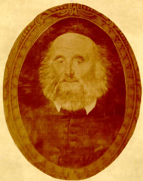 Rabbi Moses ben Menachem Kunitz (1774 – 1837)